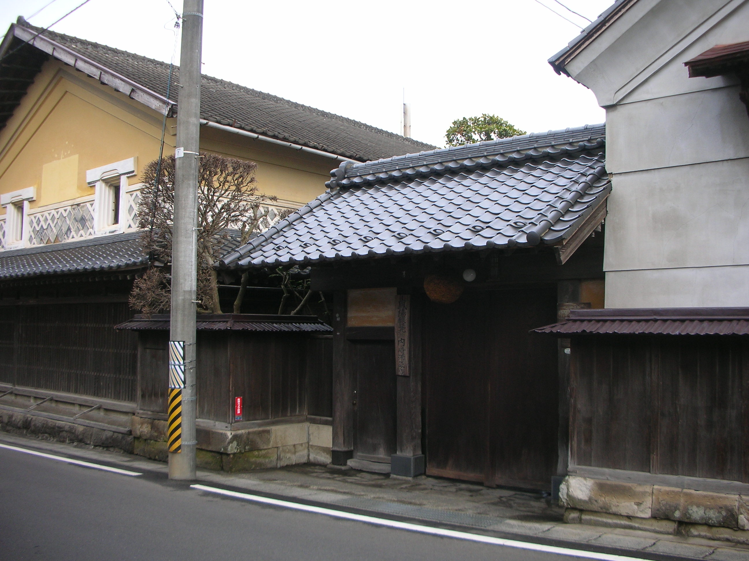 内ヶ崎酒造店（元本陣）